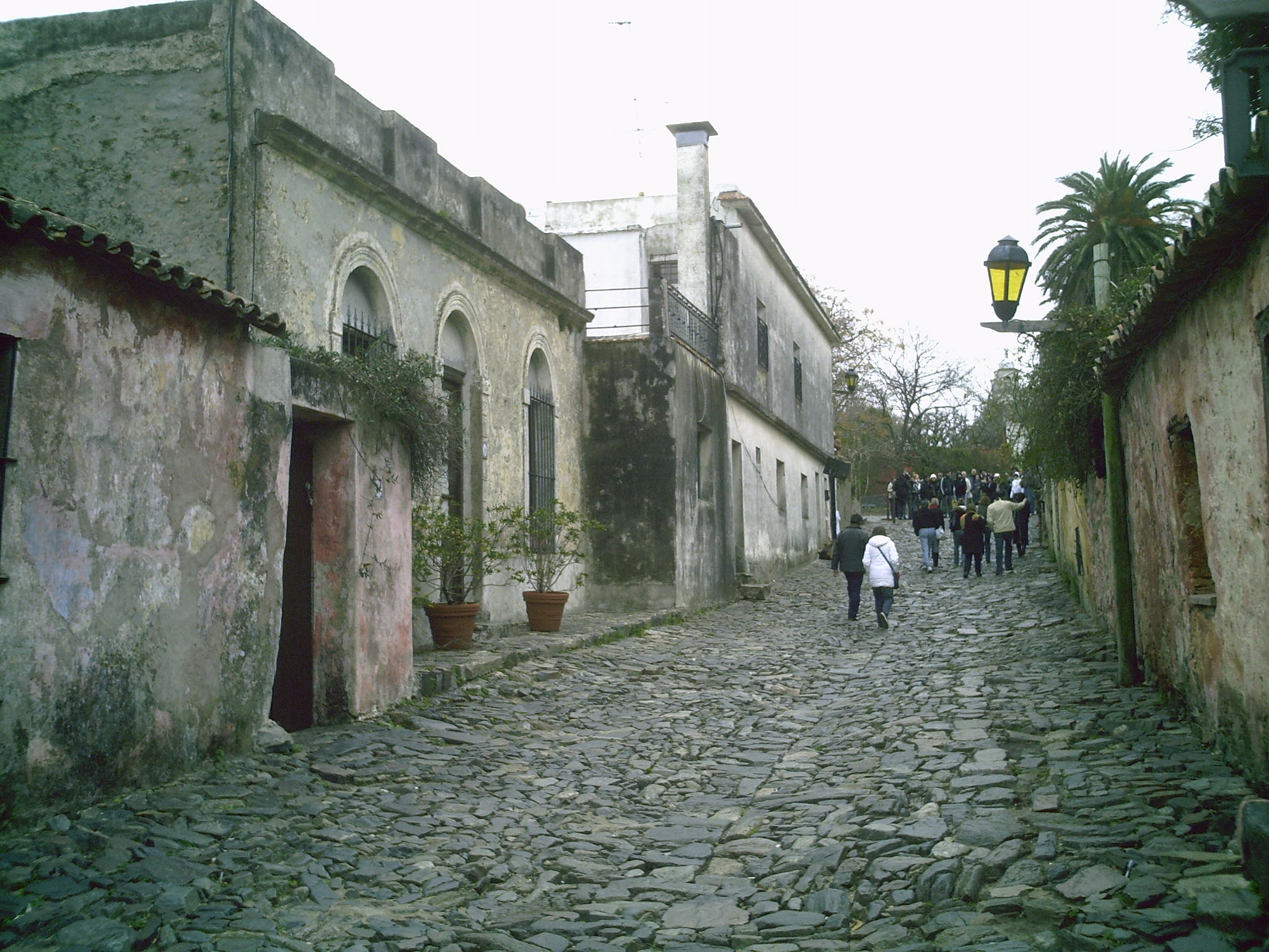 Colónia del Sacramento, no Uruguai.